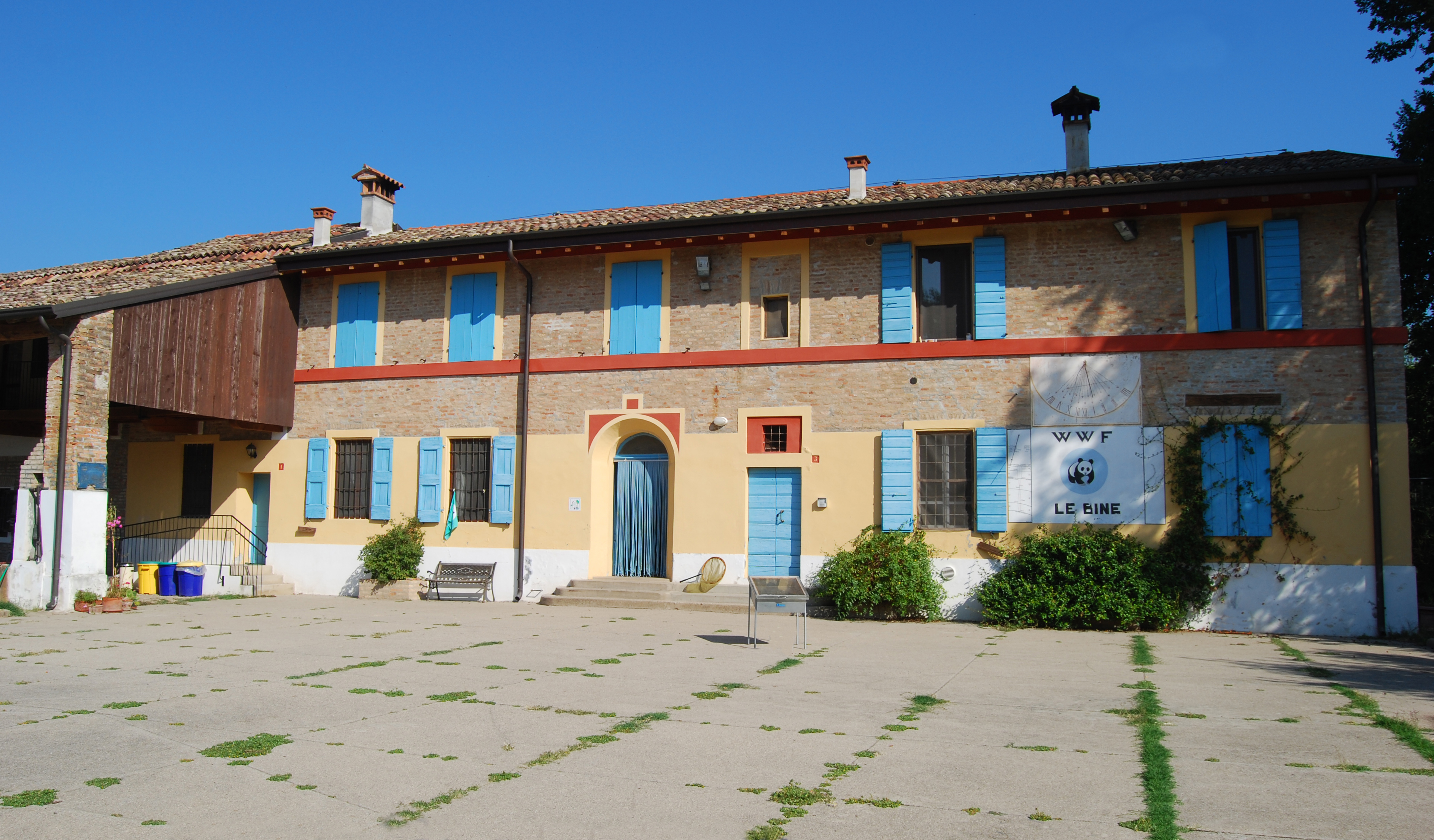 Le Bine This is a photo of a monument which is part of cultural heritage of Italy. The authorisation for taking photos of this object was provided by the World Wide Fund for Nature Italy.